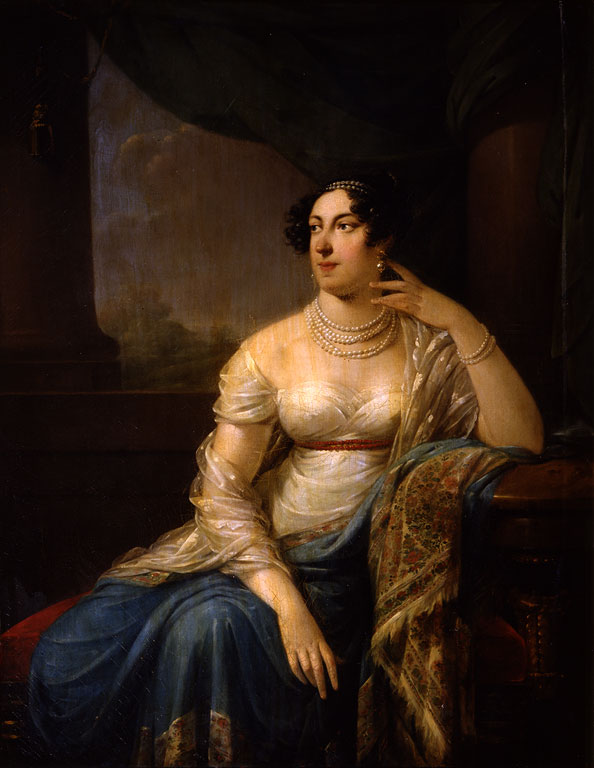 Светлейшая княгиня Наталья Юрьевна Салтыкова-Головкина (1787-1860), дочь обер-камергера и Андреевского кавалера Ю. А. Головкина. Жена графа (с 1814 г. светлейший князь) А.Н. Салтыкова.